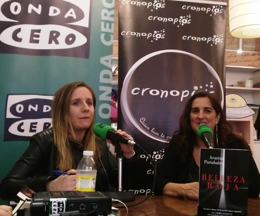 Arantza Portabales e Susana Pedreira na presentación de "Beleza Vermella" na Libraría Cronopios de Pontevedra